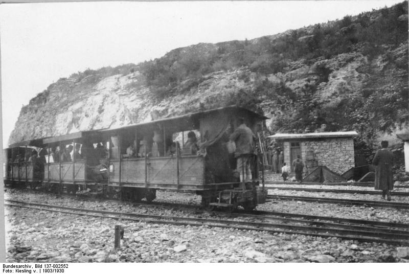 Türkei, Anatolien, Taurus, Feldbahn Die Feldbahn über den Taurus Vorderasien-Anatolien